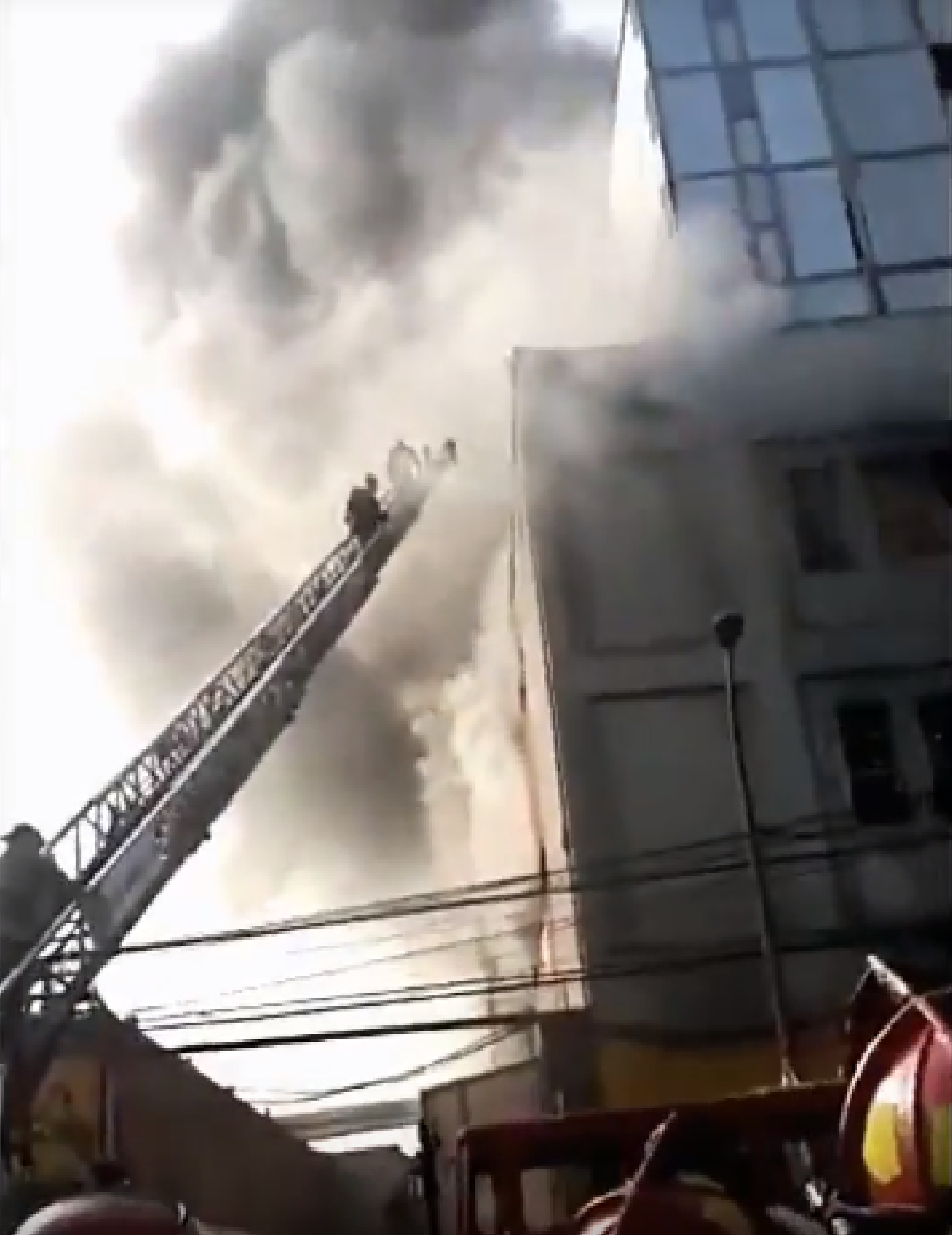 Bomberos durante el incendio de Las Malvinas.